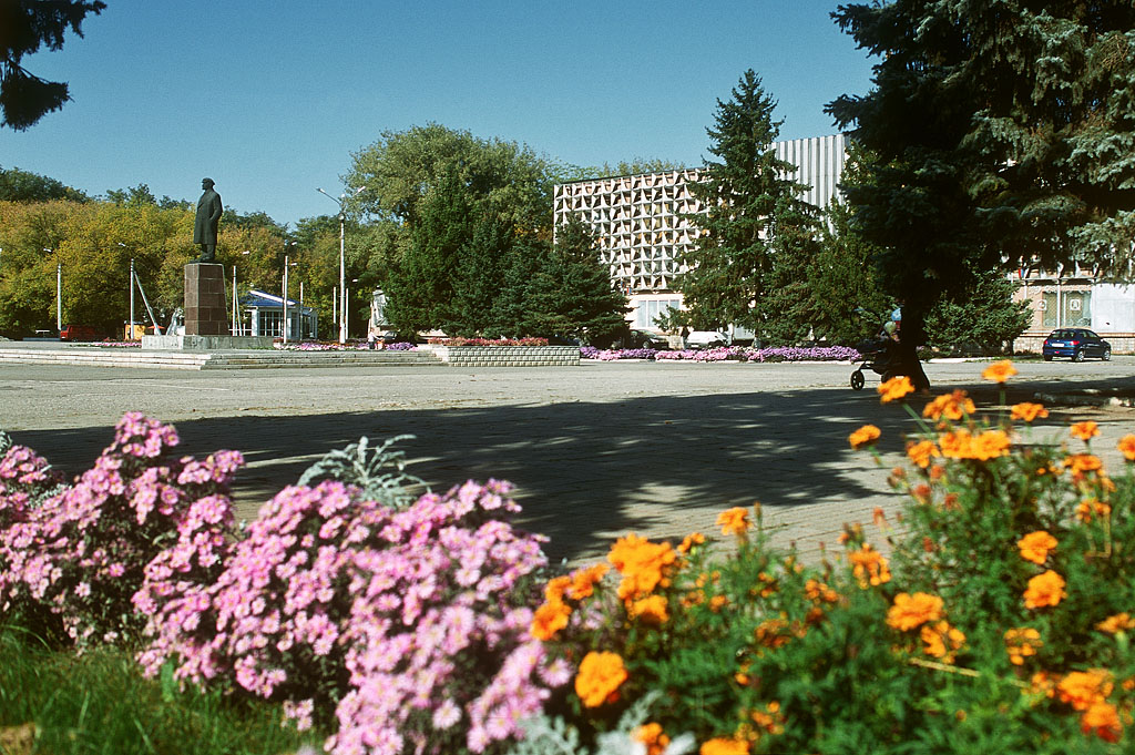 Зерноград Ростовской области. Площадь